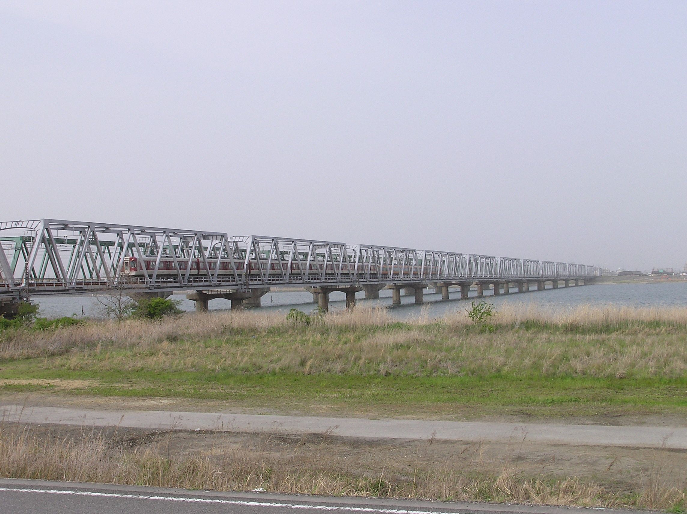 木曽川橋梁（近鉄）(愛知県弥富市、三重県桑名市)